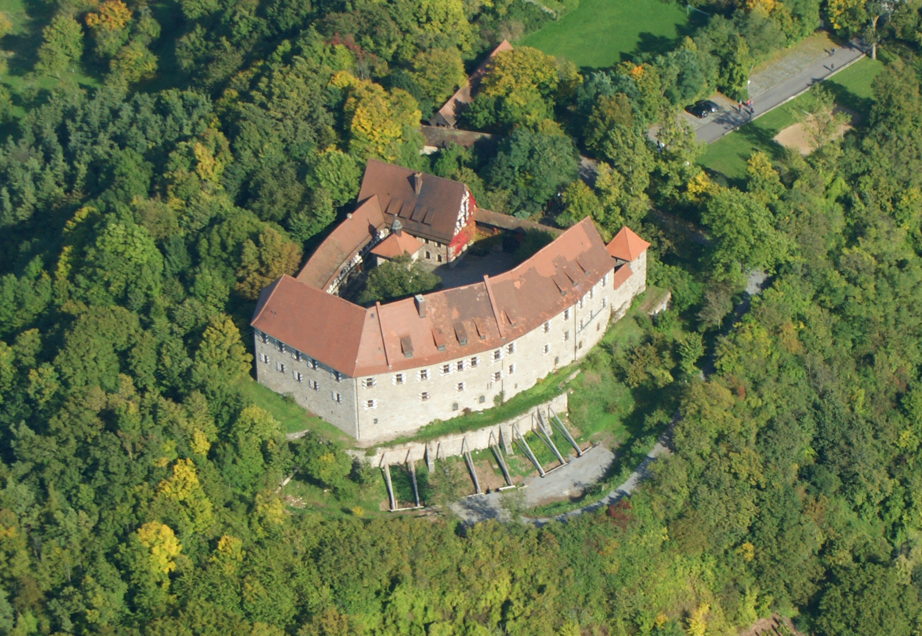 Luftbild der Burg Hoheneck im Herbst 2010